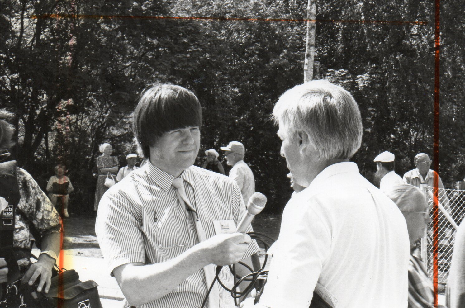 Heikki-Tapio Nieminen haastattelutyössä Herättäjäjuhlilla Mäntsälässä 9.7.1988.